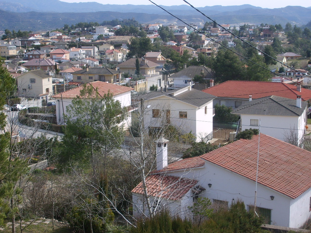 Castellgalí (Bages) Mas Planoi